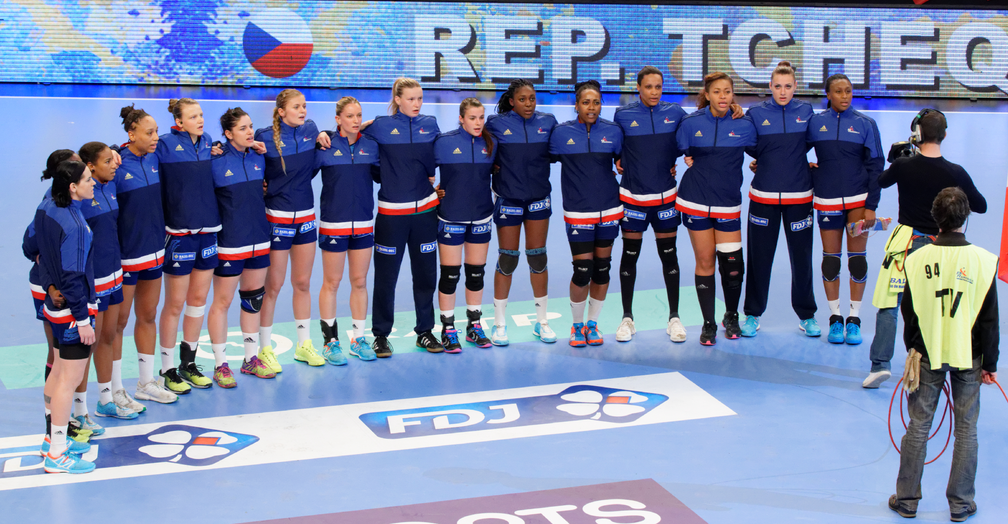 Equipe de France Le 29 novembre 2015, lors du match France / République Tchèque pour le compte du TIPIFF 2015. Au stade Pierre de Coubertin à Paris.